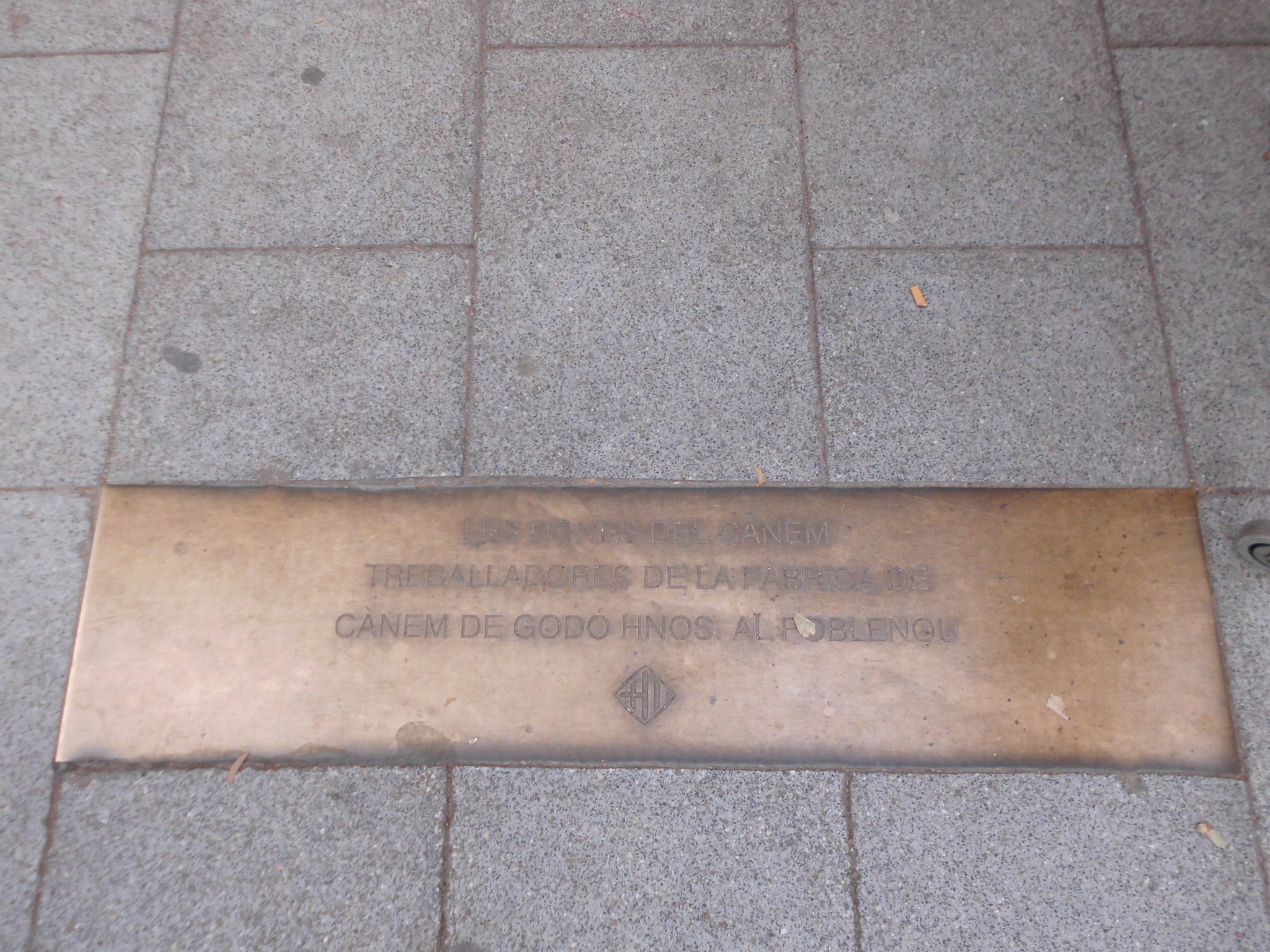 Les dones del cànem. Rambla del Poblenou (Barcelona)